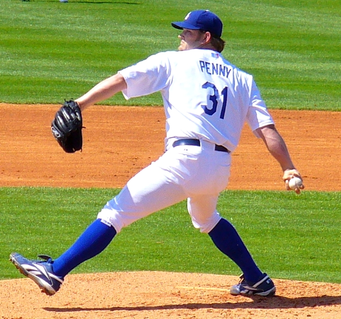 Brad Penny 03:48, 19 July 2007 . . Metsfan7 . . 700×655 (421,947 bytes)